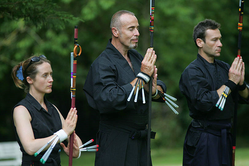 Zen-Dojo-Sarbacana (pratique du Sarbacana) Michel-Laurent Dioptaz (au centre) avec deux de ses élèves.